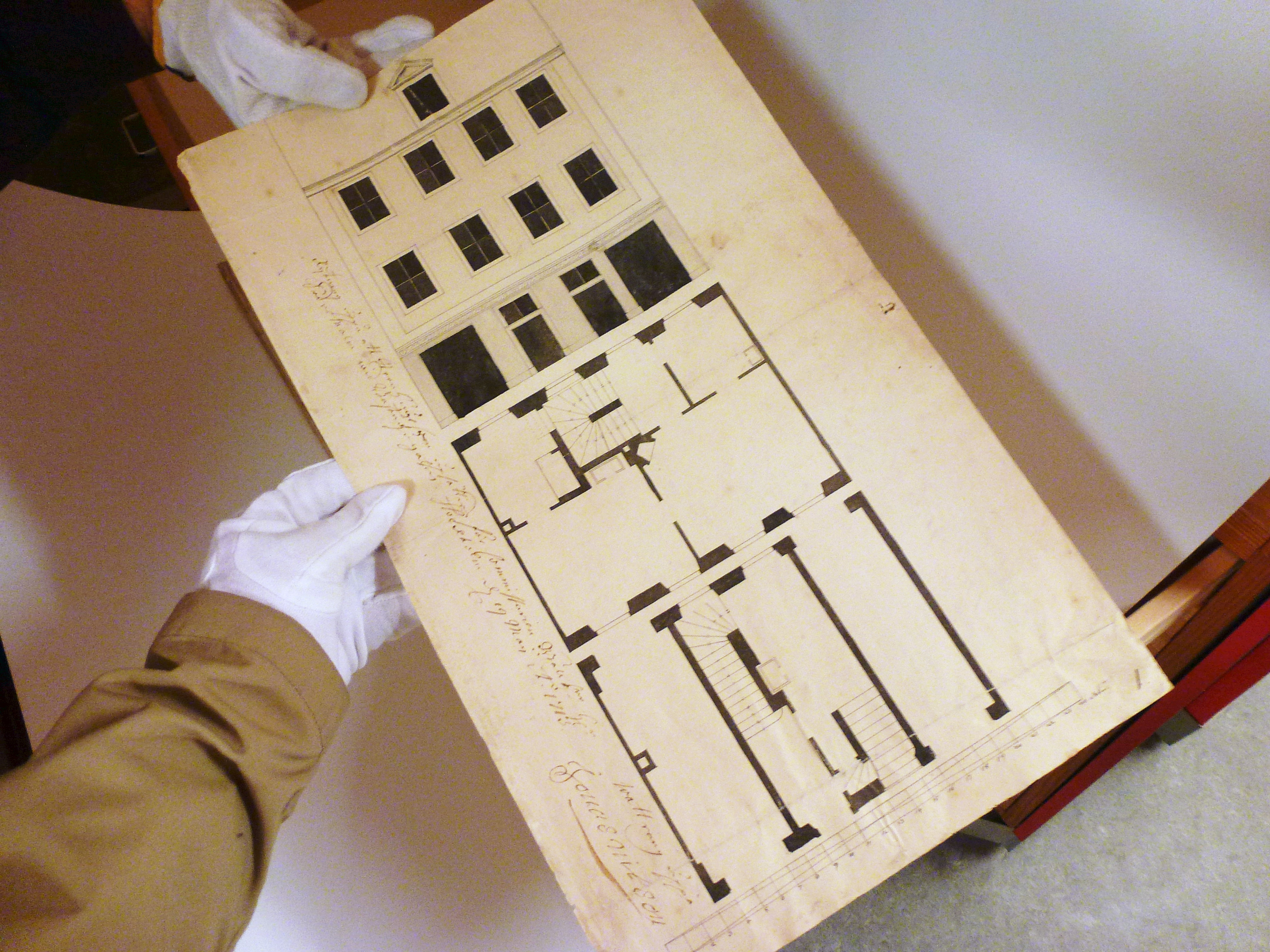 Stockholms stads äldsta bevarade bygglovsritning som ingår i världsminnet avser ett privathus vid dåvarande Bastugatan (sedermera Brännkyrkagatan och Guldgränd). Ritningen är daterad 19 maj 1713 och signerad Jonas Nilson.